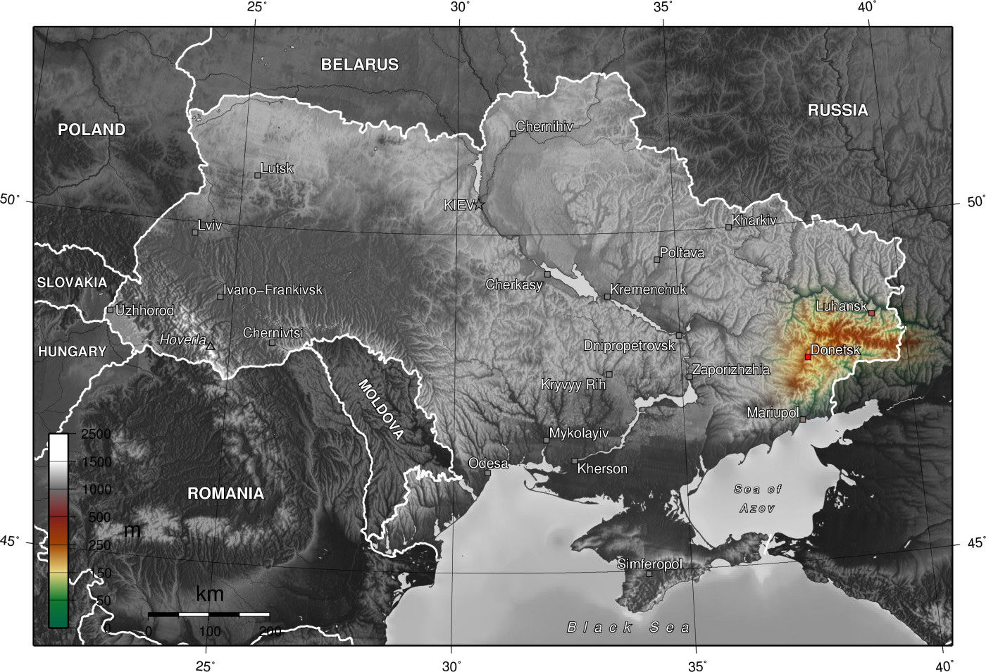 Donetsk Highlands